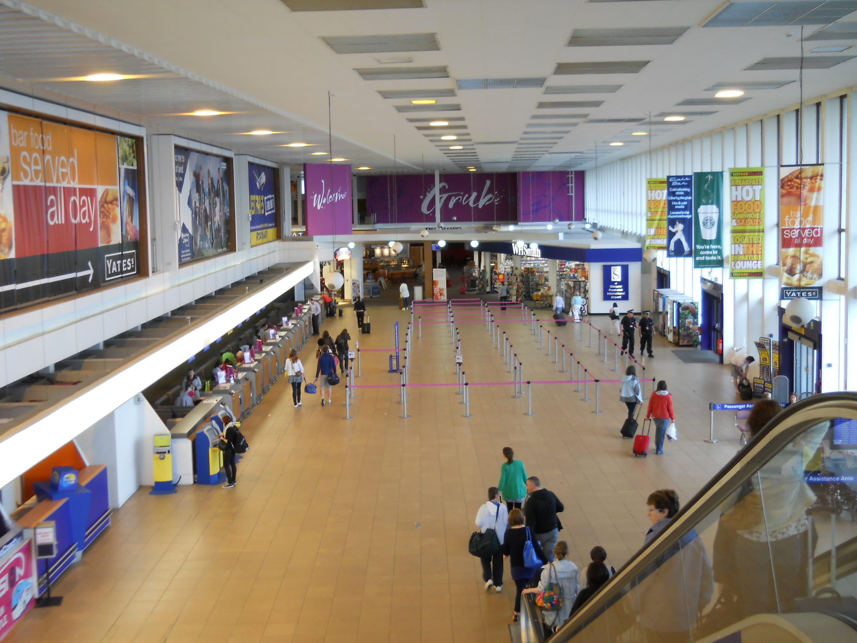 Area partenze del Glasgow Prestwick Airport.